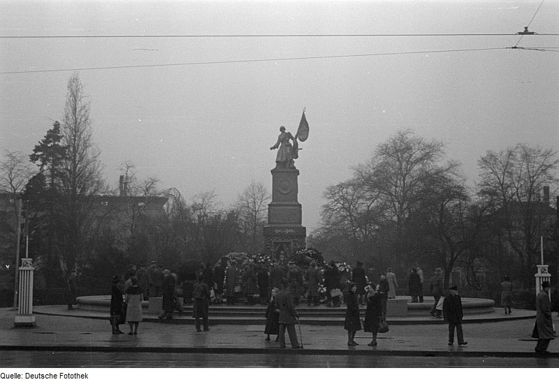 Original image description from the Deutsche FotothekSommer 1947 Denkmal der Roten Armee von Otto Rost (geschaffen 1945) ehemaliger Standort ist der heutige Albertplatz / Dresden-Neustadt. Heutiger Standort: Olbrichtplatz